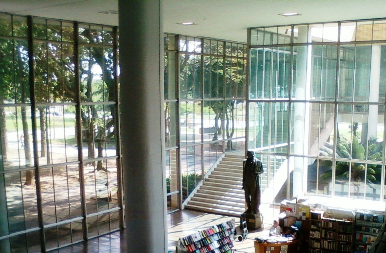 Hall da reitoria da UFRJ.